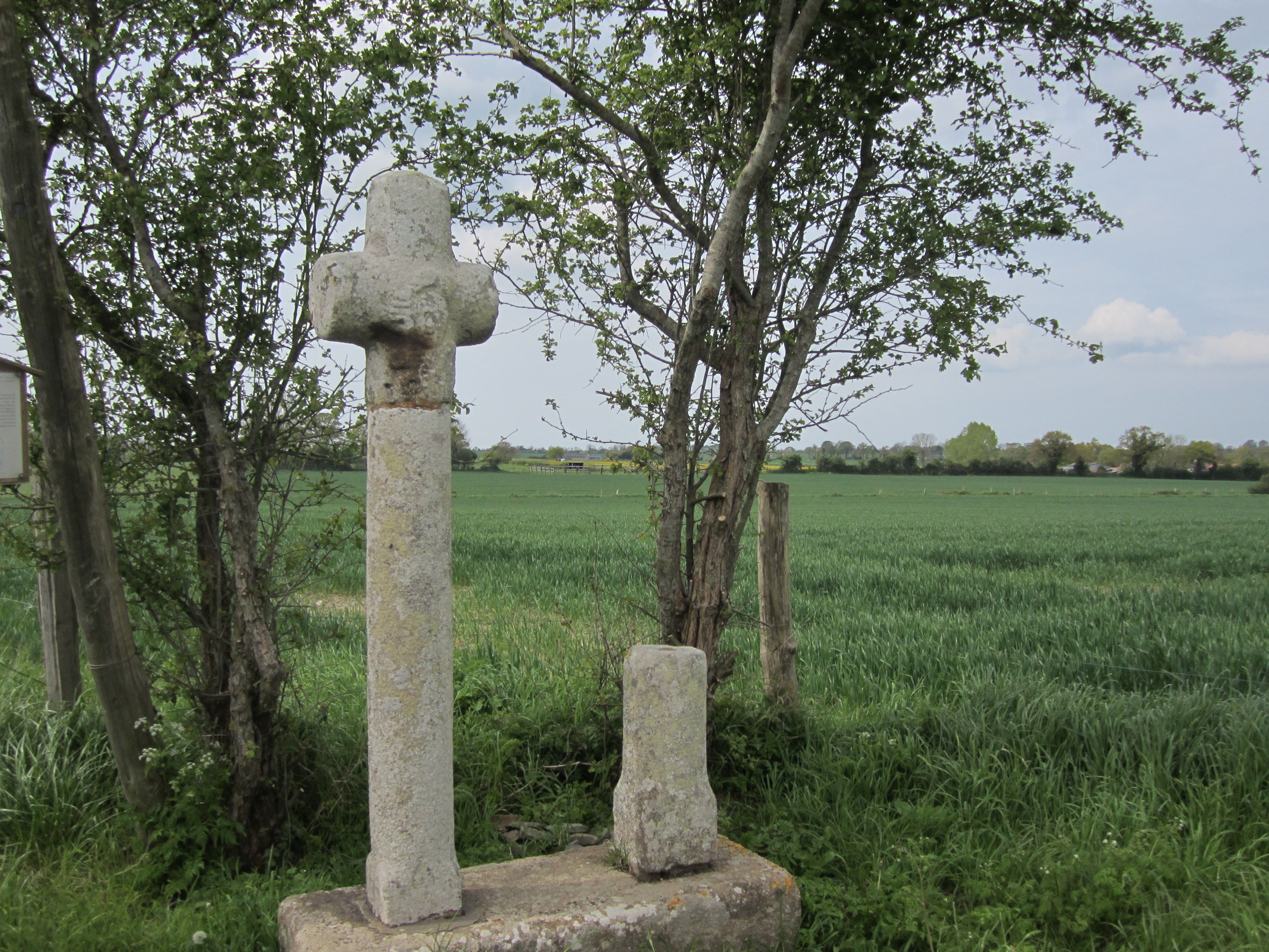 Vains, Manche